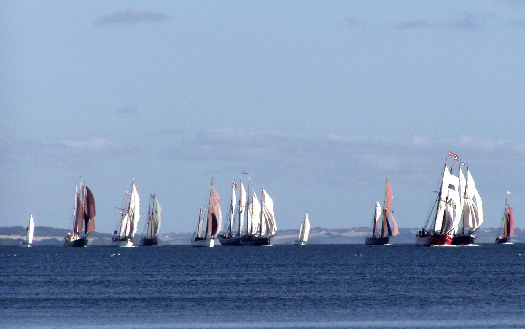 Sailships Limfjorden Rundt 2007